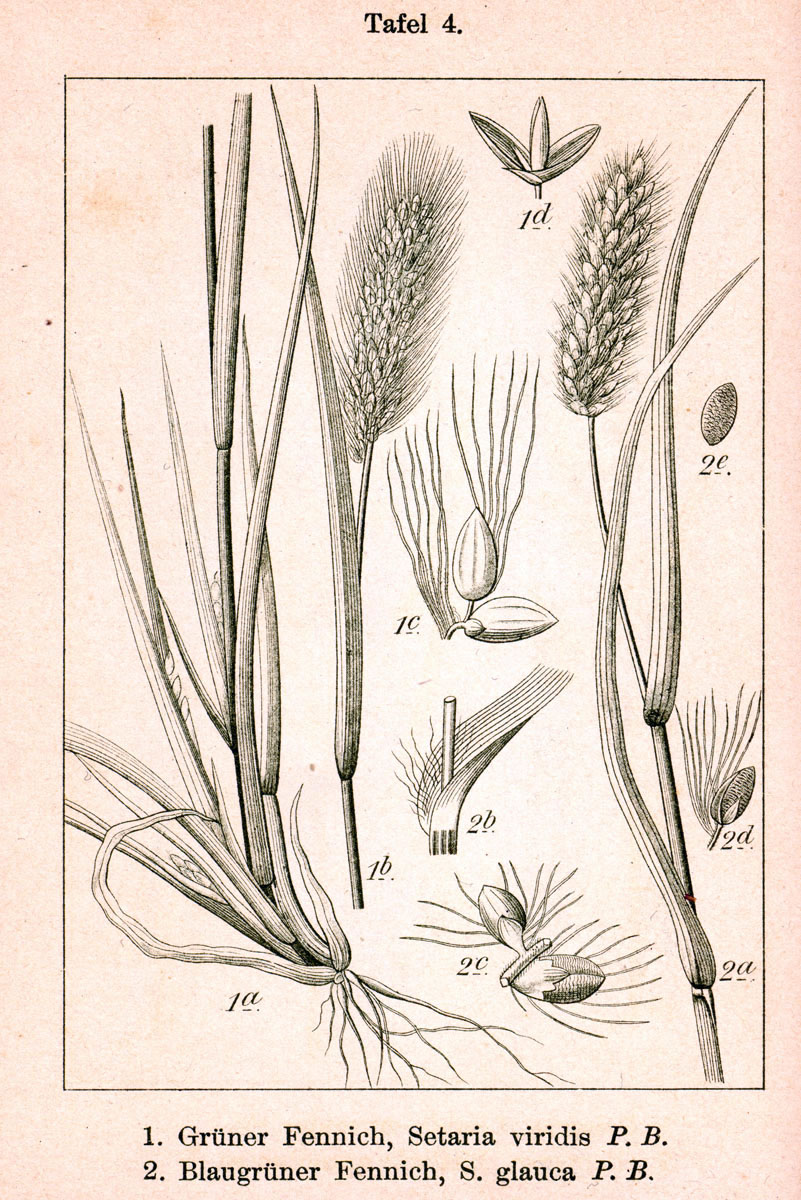 1: Setaria viridis (L.) P.Beauv. 2. Pennisetum glaucum (L.) R.Br., syn. Cenchrus americanus (L.) Morrone, Setaria glauca (L.) P.Beauv. Original Description 1. Grüner-Fennich, Setaria viridis P. B. 2. Blaugrüner Fennich, Setaria glauca P. B.